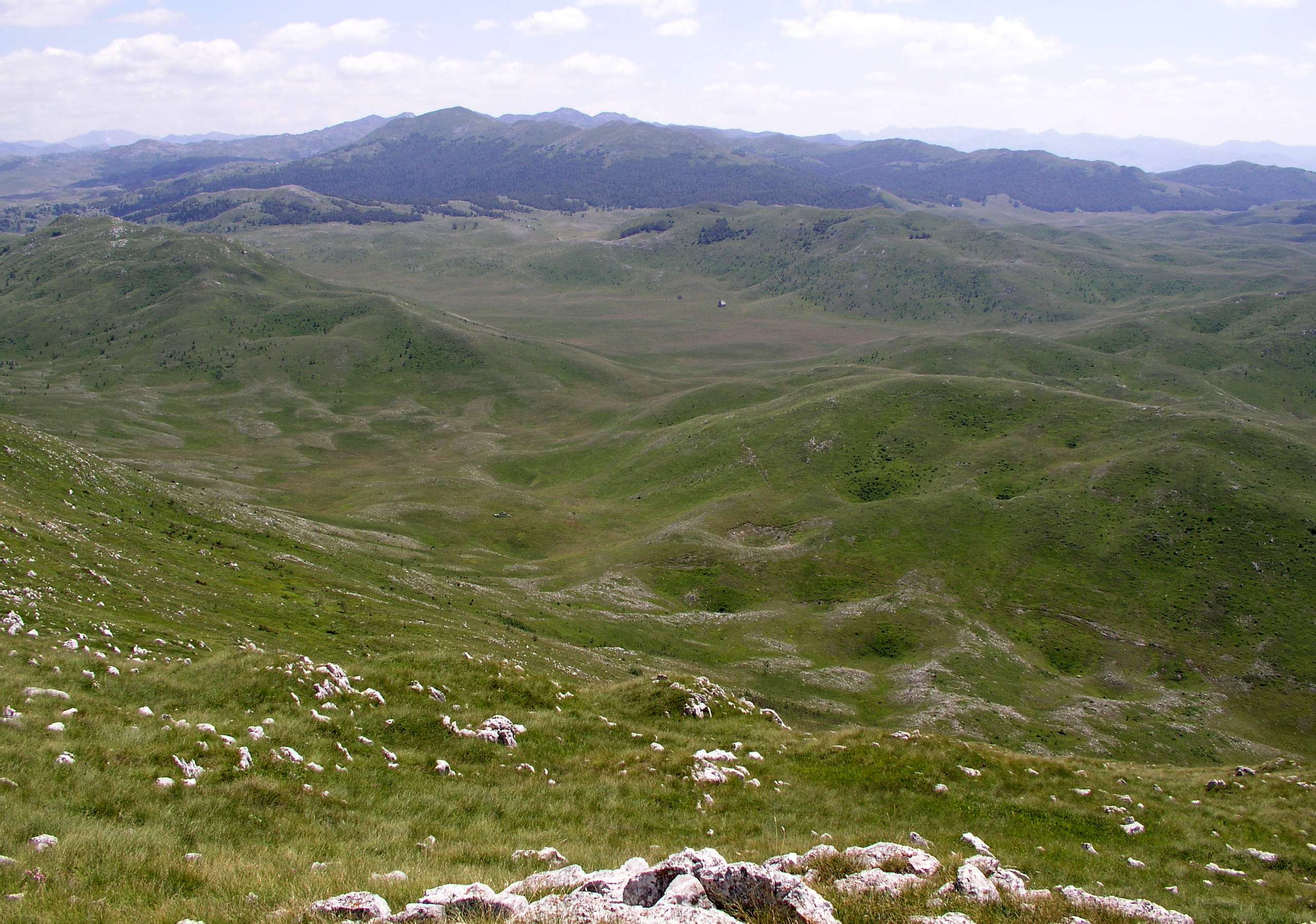 Sinjajevina (NW part)